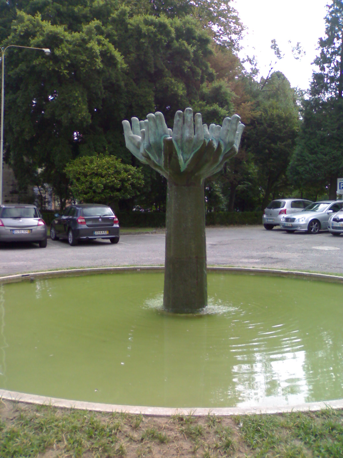 escultura "Universo 3 + 4" (1987) de Irene Vilar presente no Parque de Nova Sintra no Porto